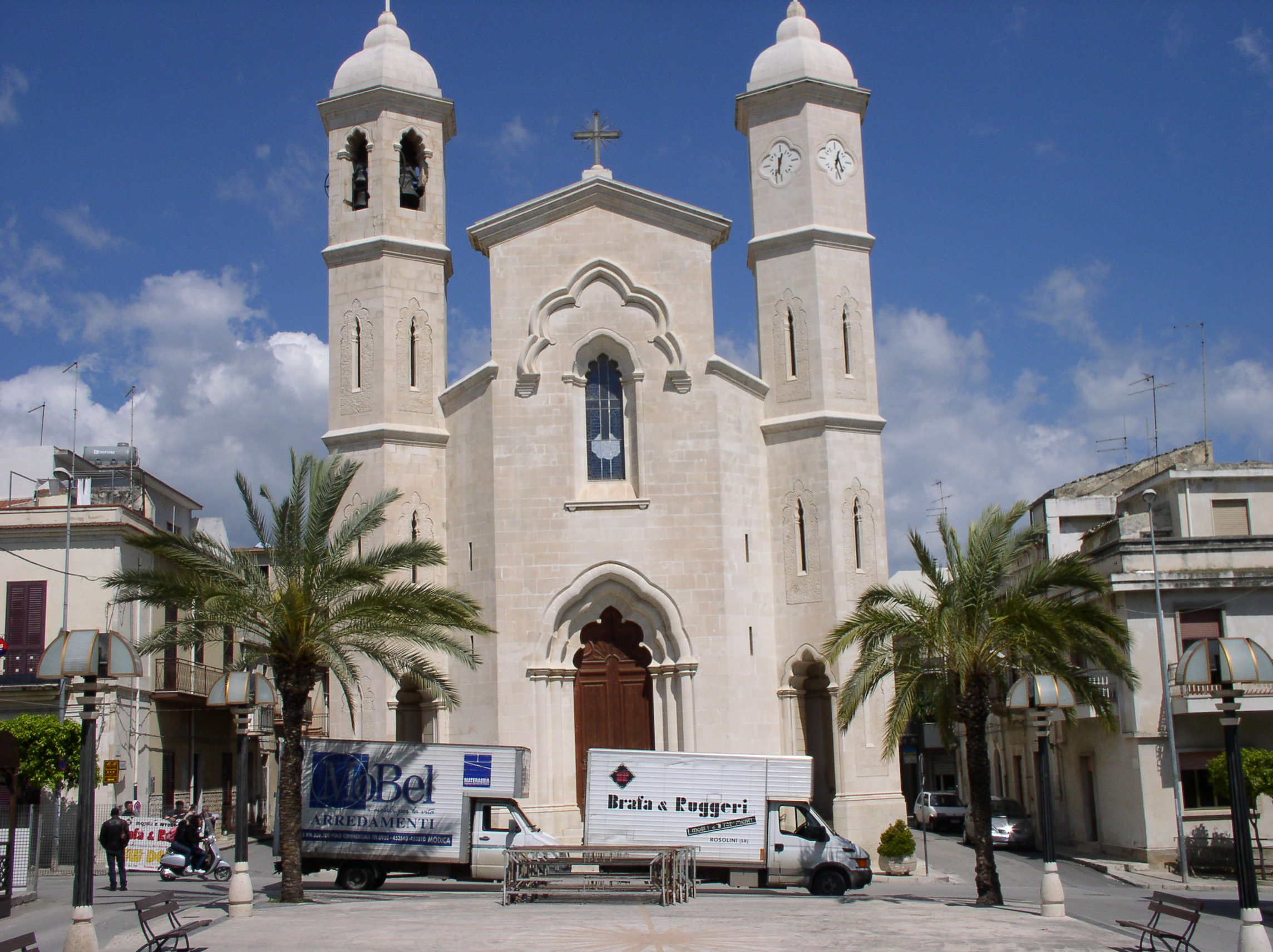 Rosolini, chiesa del SS. Crocifisso.